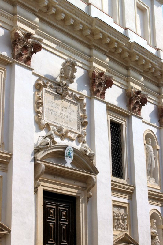 Chiesa di San Gaetano a Padova